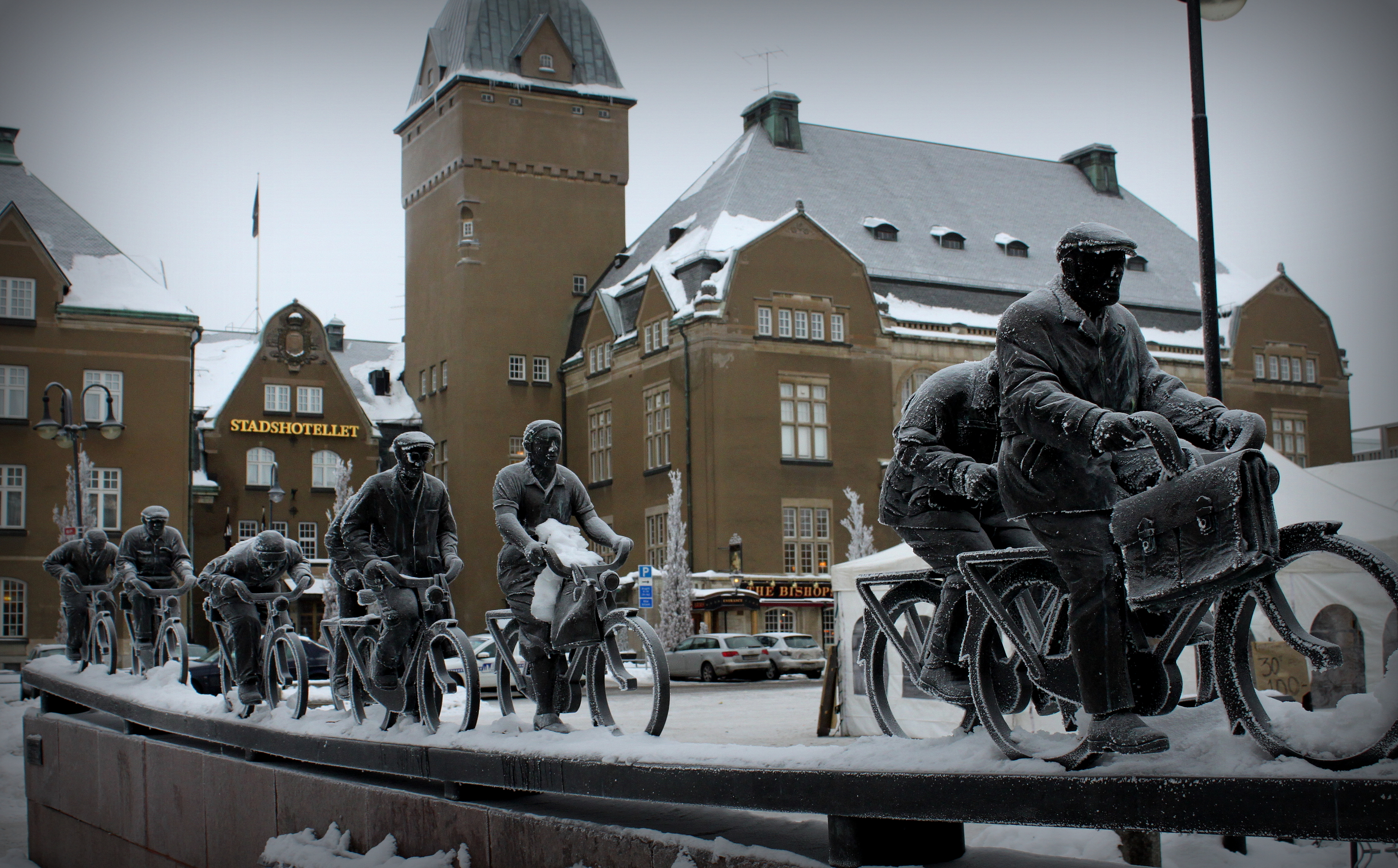 Stadshotellet i Västerås. I förgrunden skulpturen ASEA-strömmen av Bengt-Göran Broström.